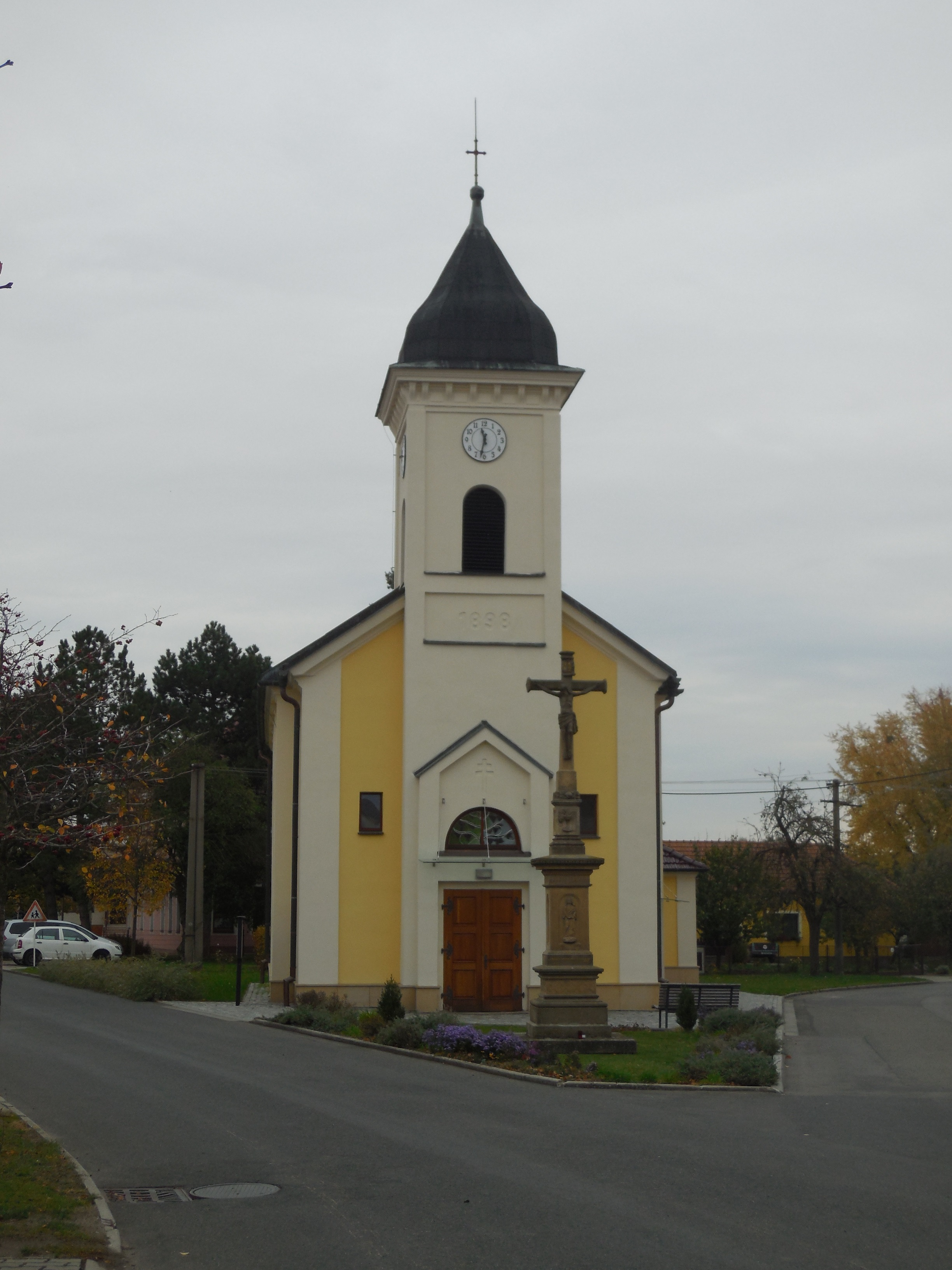 Kostel sv. Cyrila a Metoděje - Babice u Uherského Hradiště, po rekonstrukci